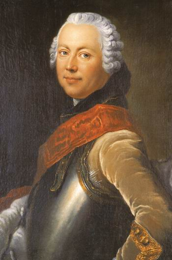 Friedrich III. (Regimentschef des Fränkischen Kreis-Kürassierregiment vgl. Liste der Regimenter des fränkischen Reichskreises)